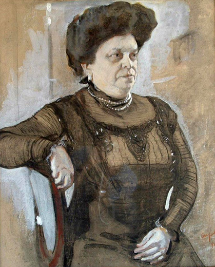 Валентин Серов. Портрет Анны Цетлиной. 1909. Бумага на картоне, акварель, белила. Музей русского искусства, Рамат-Ган